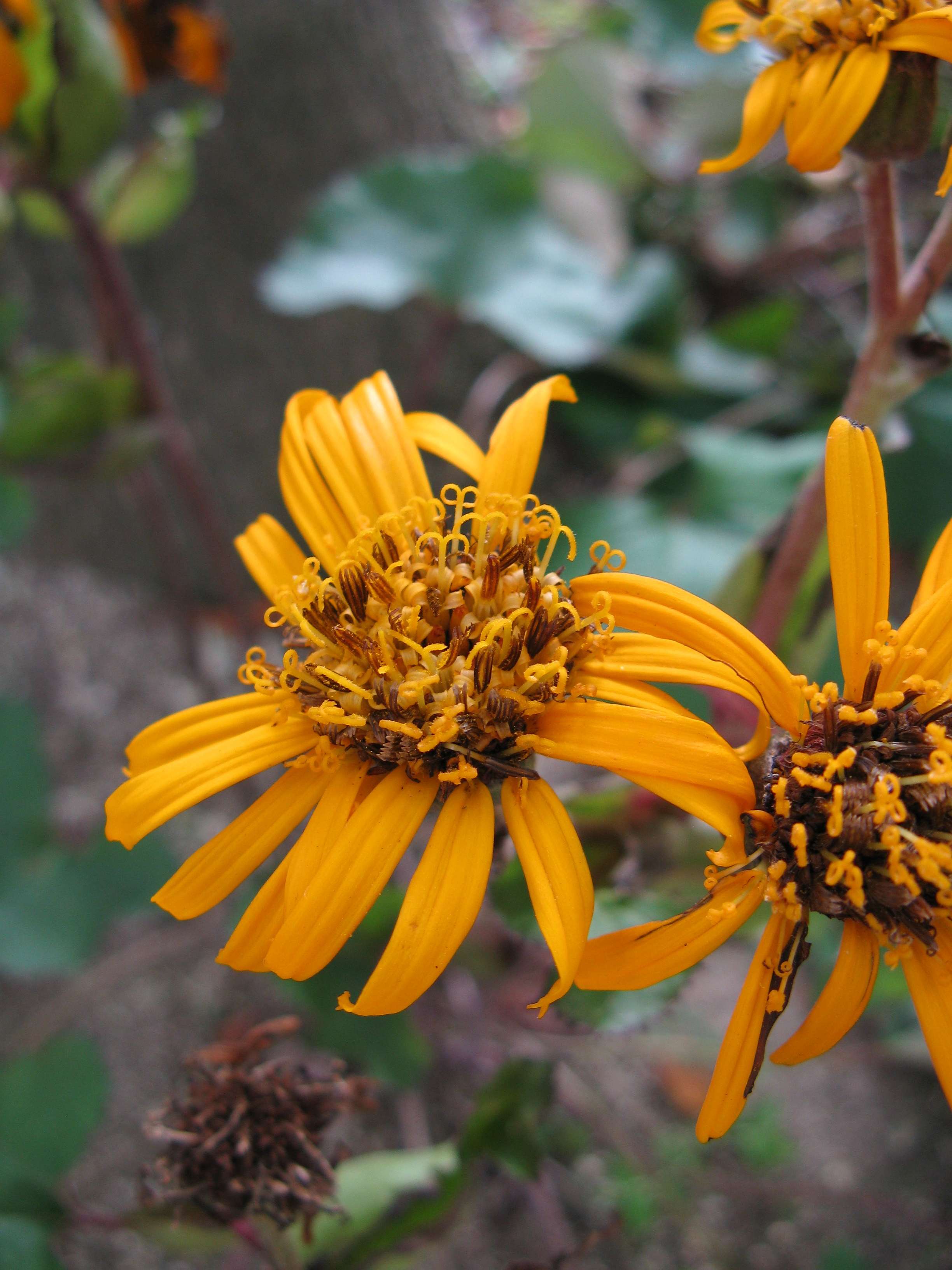 Scientific name Ligularia dentata 'Britt Marie Crawford'